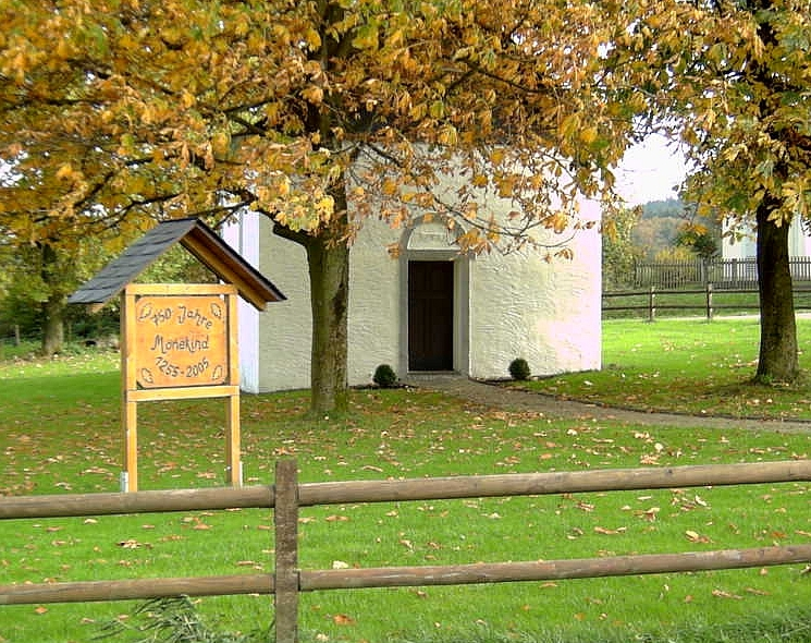 Mönekind (Schmallenberg), Kapelle Hl. Margaretha, Anno 1673, Germany.